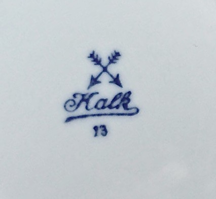 Porzellanwerk Kalk: Porzellanmarke aus den 1930er Jahren